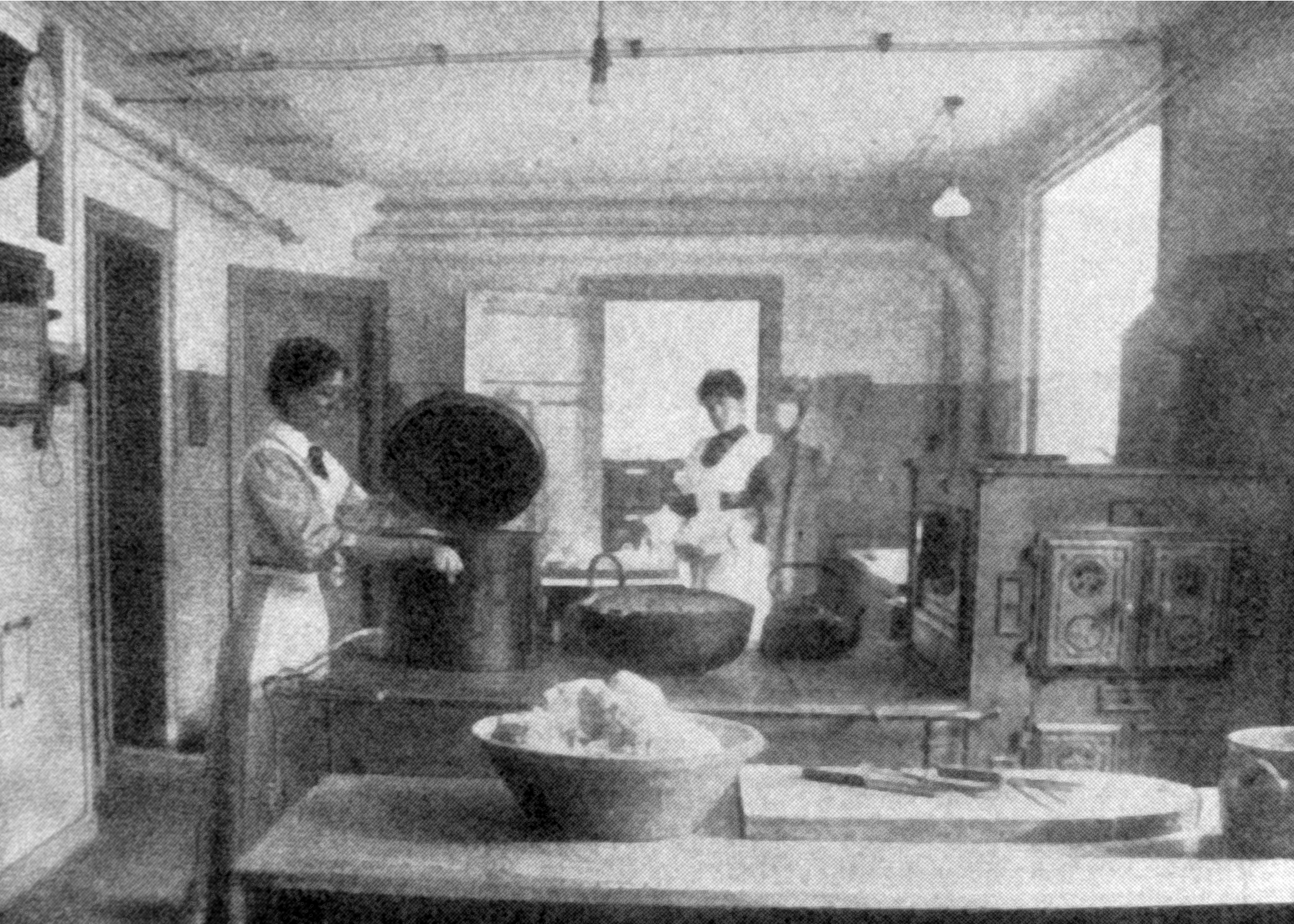 centralbyggnad kopenhagen - einküchenhaus